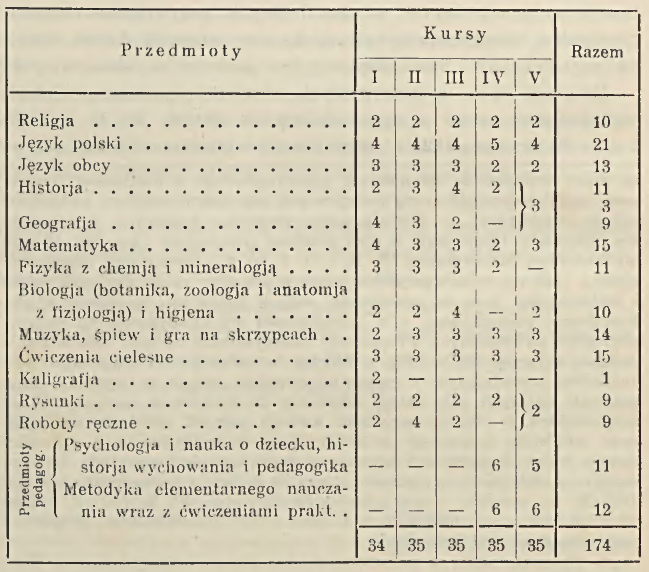 Rozporządzenie Ministra Wyznań Religijnych i Oświecenia Publicznego z dnia 30 maja 1926 w sprawie planu godzin szkolnych w państwowych seminarjach nauczycielskich